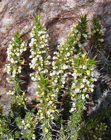 Imagen de la especie Nassauvia ulicina